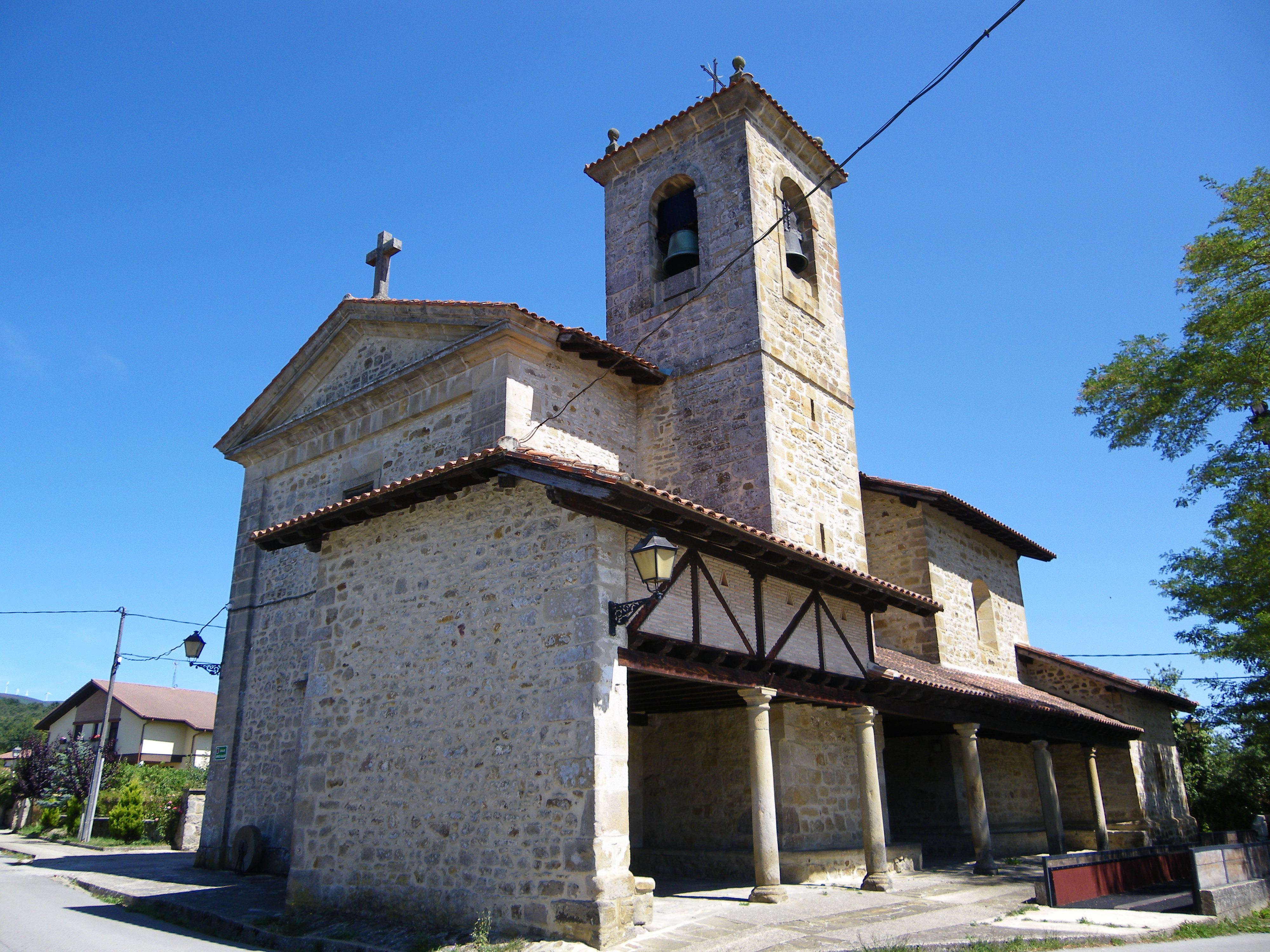 Marietako parrokia-eliza Barrundia udalerri osoko tenplu nabarmenetako bat da, Marieta, Barrundia, Araba, Euskal Herria.